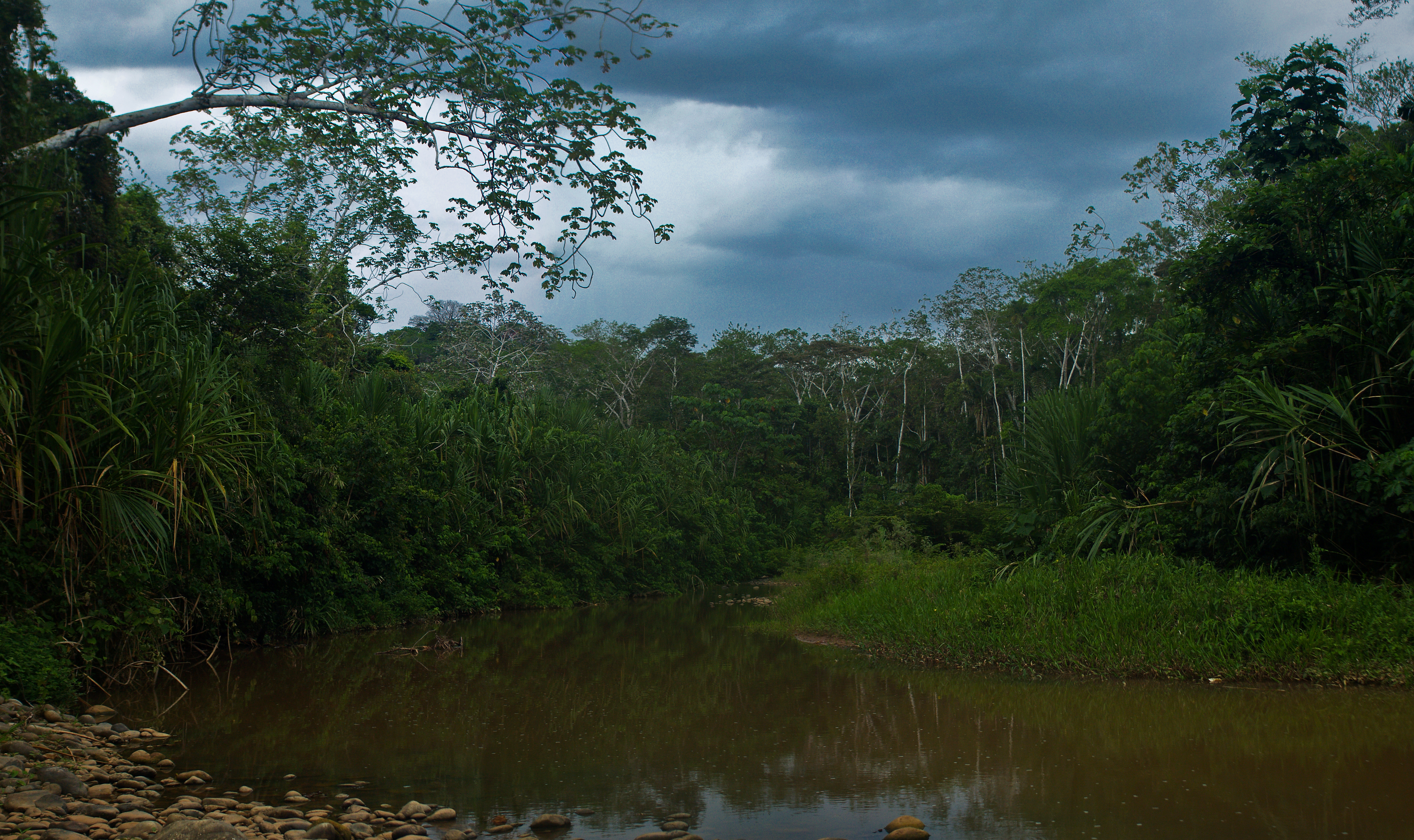 vista del río Madidi, del cual toma nombre el Parque Nacional homonimo en el departamento de La Paz, Bolivia.